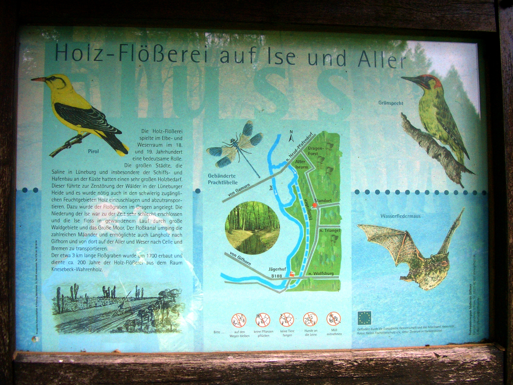 Informationstafel im Waldgebiet Dragen östlich der Ise zum Thema der früher betriebenen Flößerei auf der Ise.